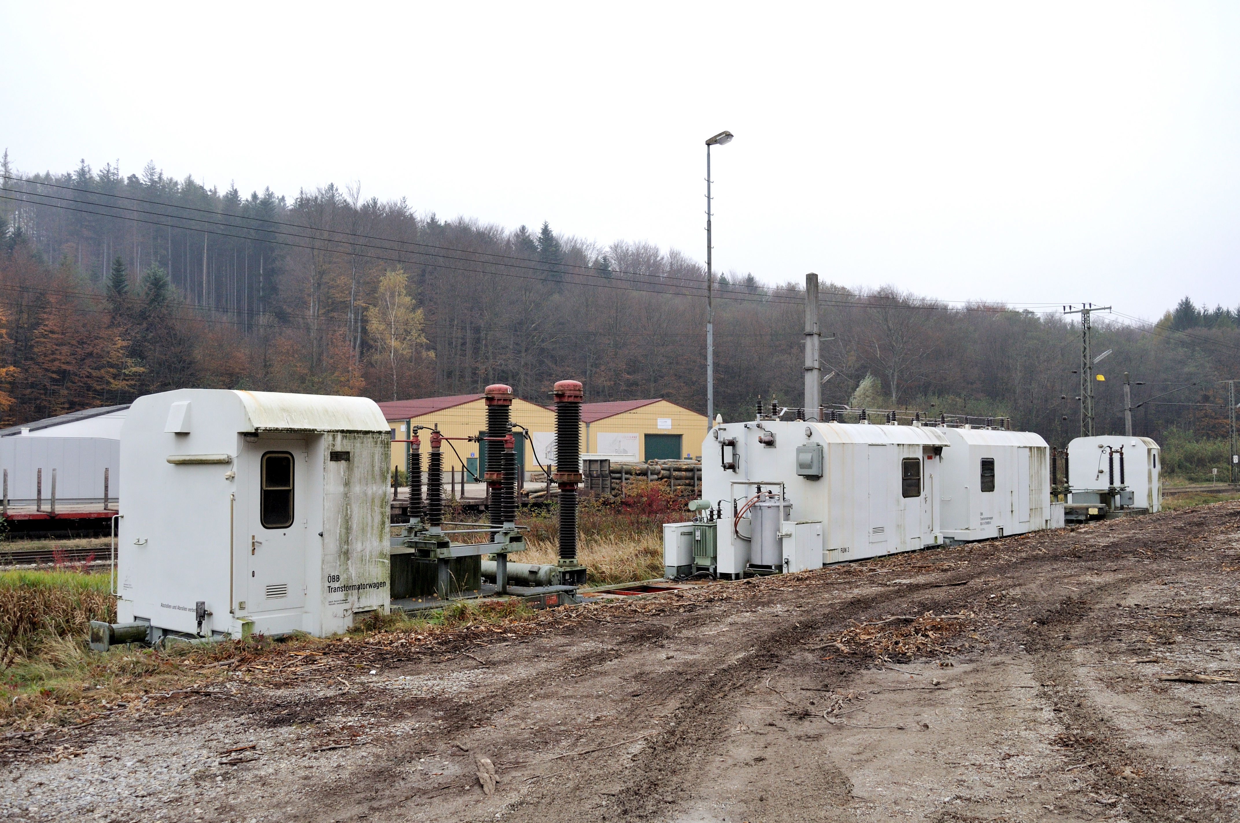 Transformatorwagen (fahrbare Unterwerke) 80 81 9769 006-4 (FUW 3) und 80 81 9769 009-8 (FUW 4) am Bahnhof Rekawinkel.